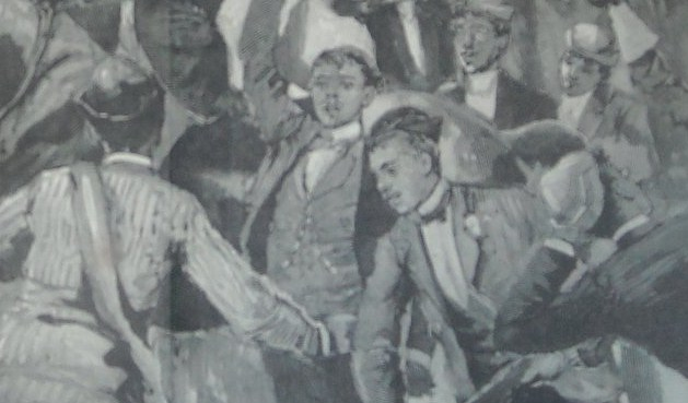 Détail d'une gravure figurant l'arrivée du tonneau envoyé par les étudiants de Turin aux étudiants de Bologne pour les fêtes commémorant le VIIIème centenaire de l'université de Bologne. On y voit des étudiants coiffés de l'orsina, qui sera remplacée par la feluca quelques années plus tard.